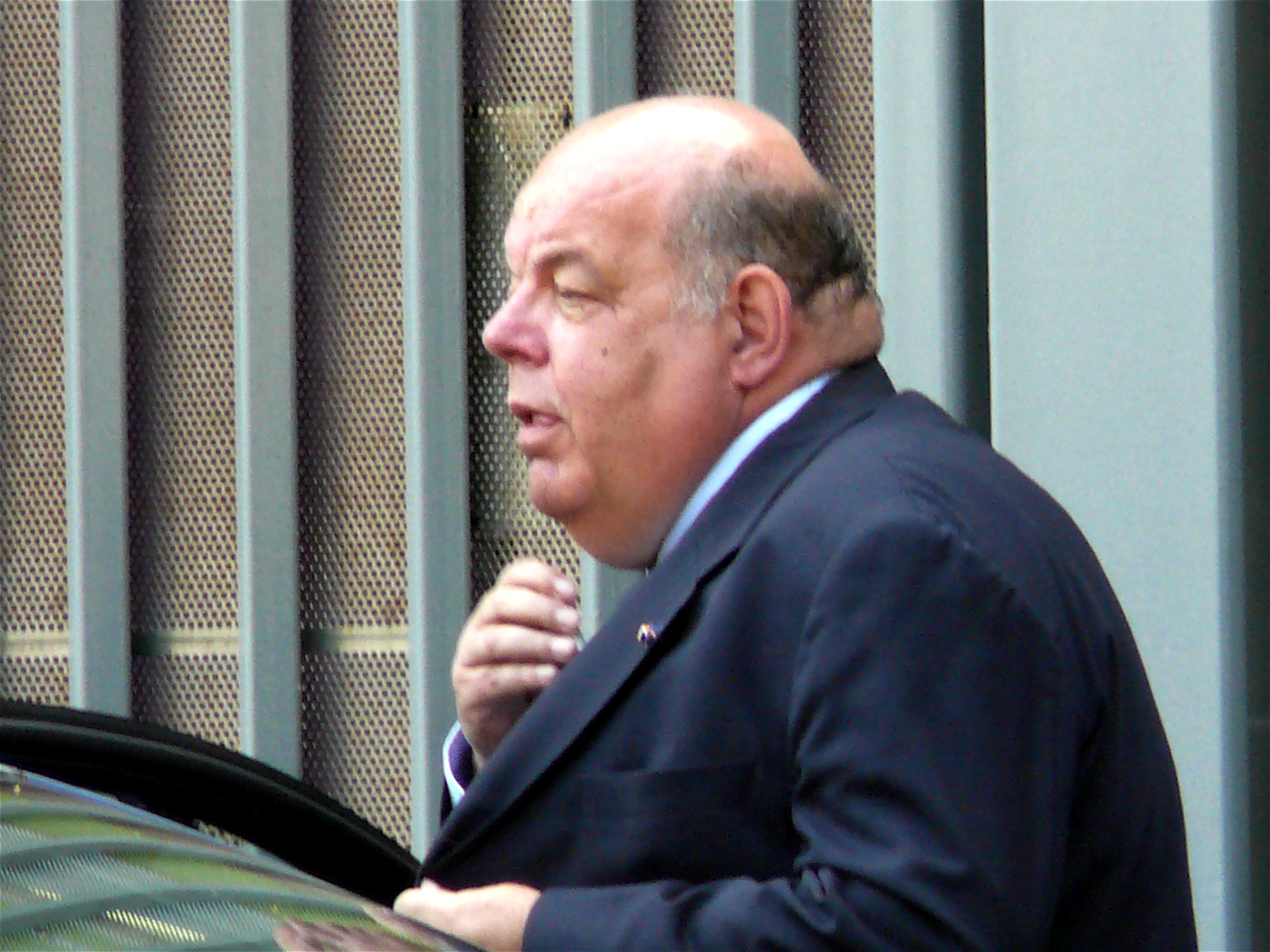 Arthur Winfried Hein Docters van Leeuwen (Den Haag, 8 mei 1945) is een Nederlands jurist en topambtenaar. Docters van Leeuwen begon zijn loopbaan in 1969 als ambtenaar op de afdeling wetgeving, hoofdafdeling Pensioenen en Wachtgelden, directoraat-generaal Overheidspersoneelsbeleid bij het Ministerie van Binnenlandse Zaken. Daarna was hij van 1970 tot 1980 inspecteur der Rijksfinanciën bij het ministerie van Financiën. In 1980 keerde hij terug op het Ministerie van Binnenlandse Zaken als plaatsvervangend directeur politie op het directoraat-generaal Openbare Orde en Veiligheid. In 1981 werd hij plaatsvervangend directeur-generaal voor Openbare Orde en Veiligheid. Begin 1989 werd Docters van Leeuwen benoemd als hoofd van de Binnenlandse Veiligheidsdienst (BVD), de huidige AIVD. Hij werd in 1995 opgevolgd door viceadmiraal Nico Buis.